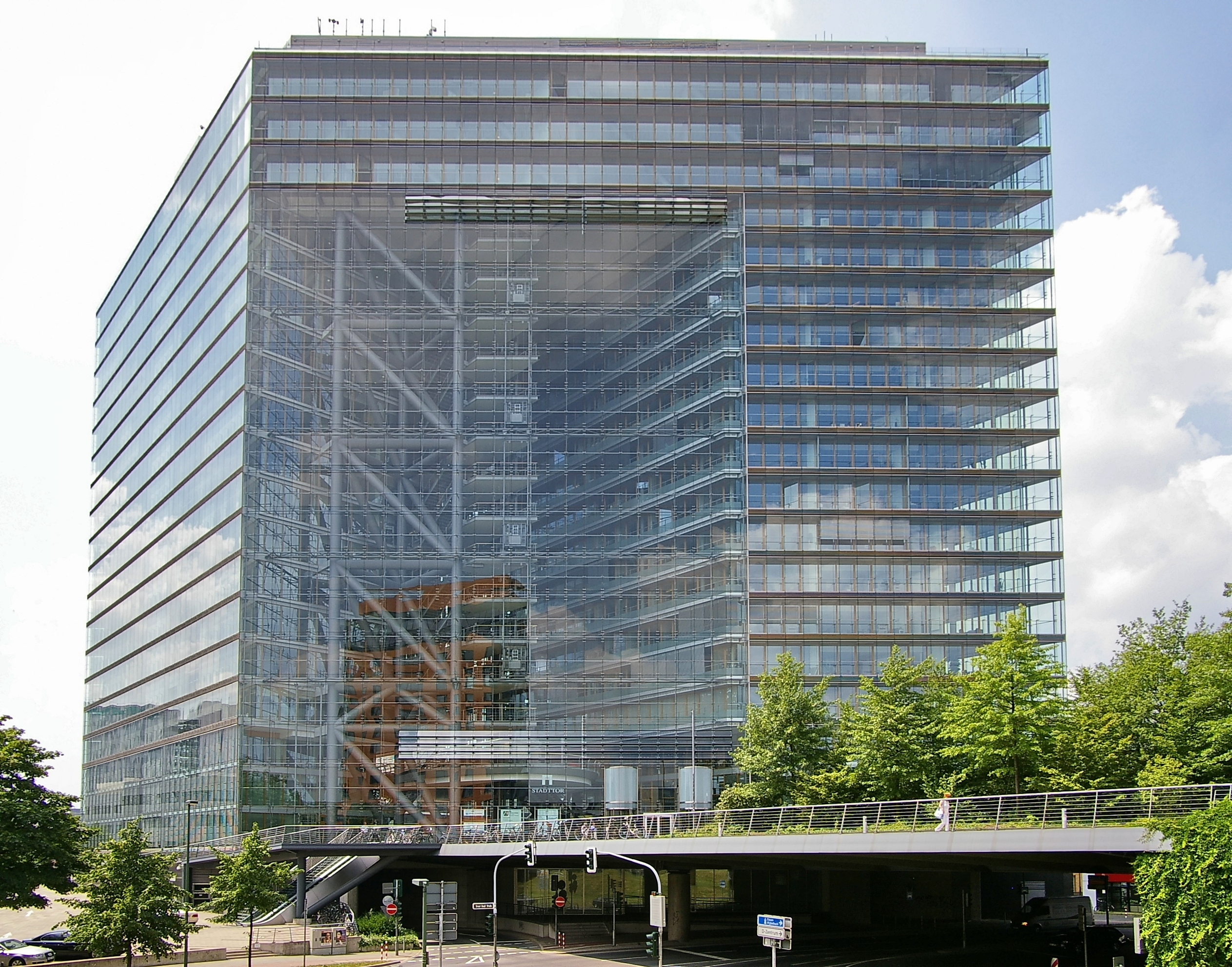 Stadttor, Ansicht aus Richtung Innstadt, Blick südwärts